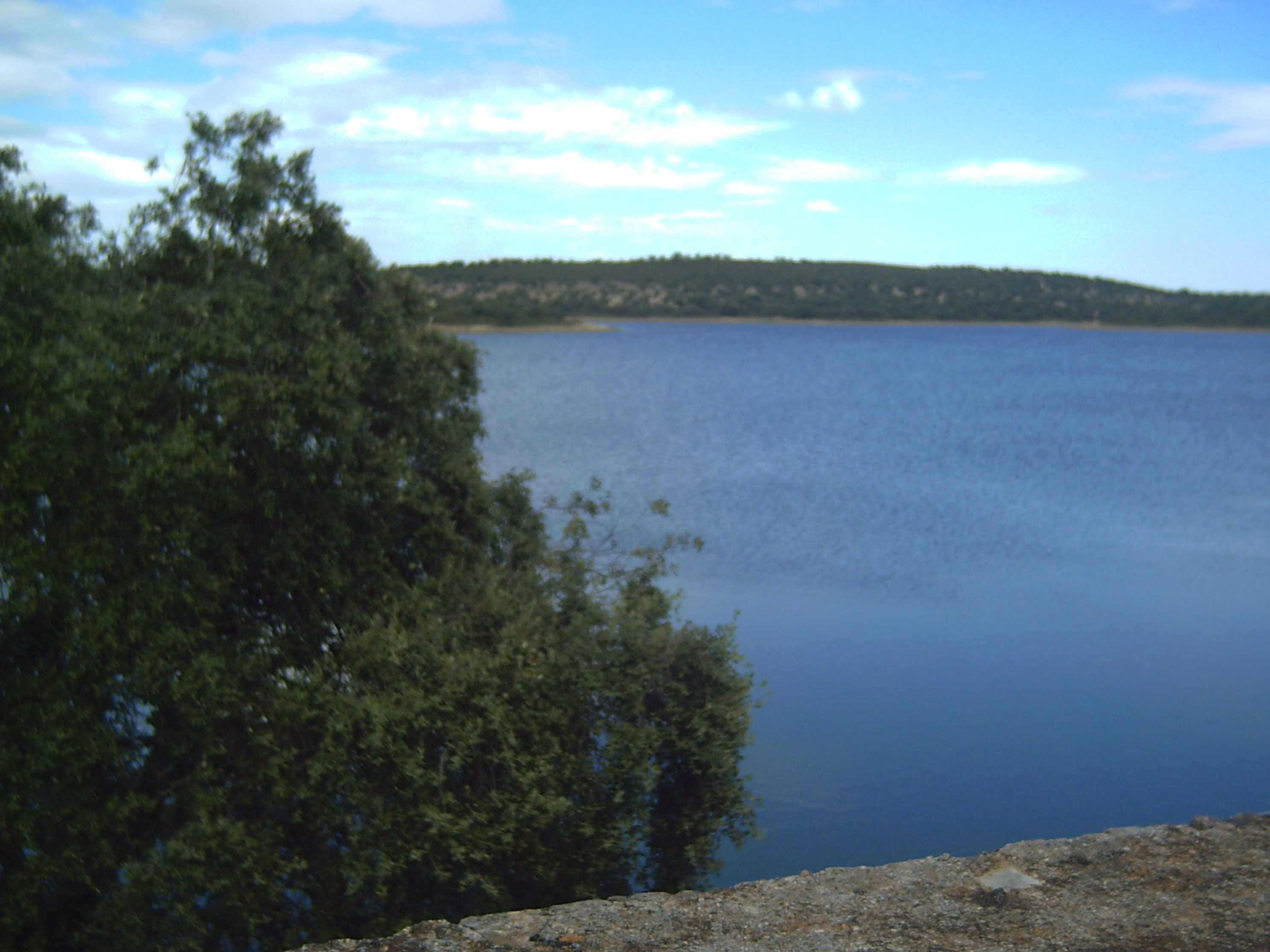 Parqui Natural de Cornalvu (Estremaura)